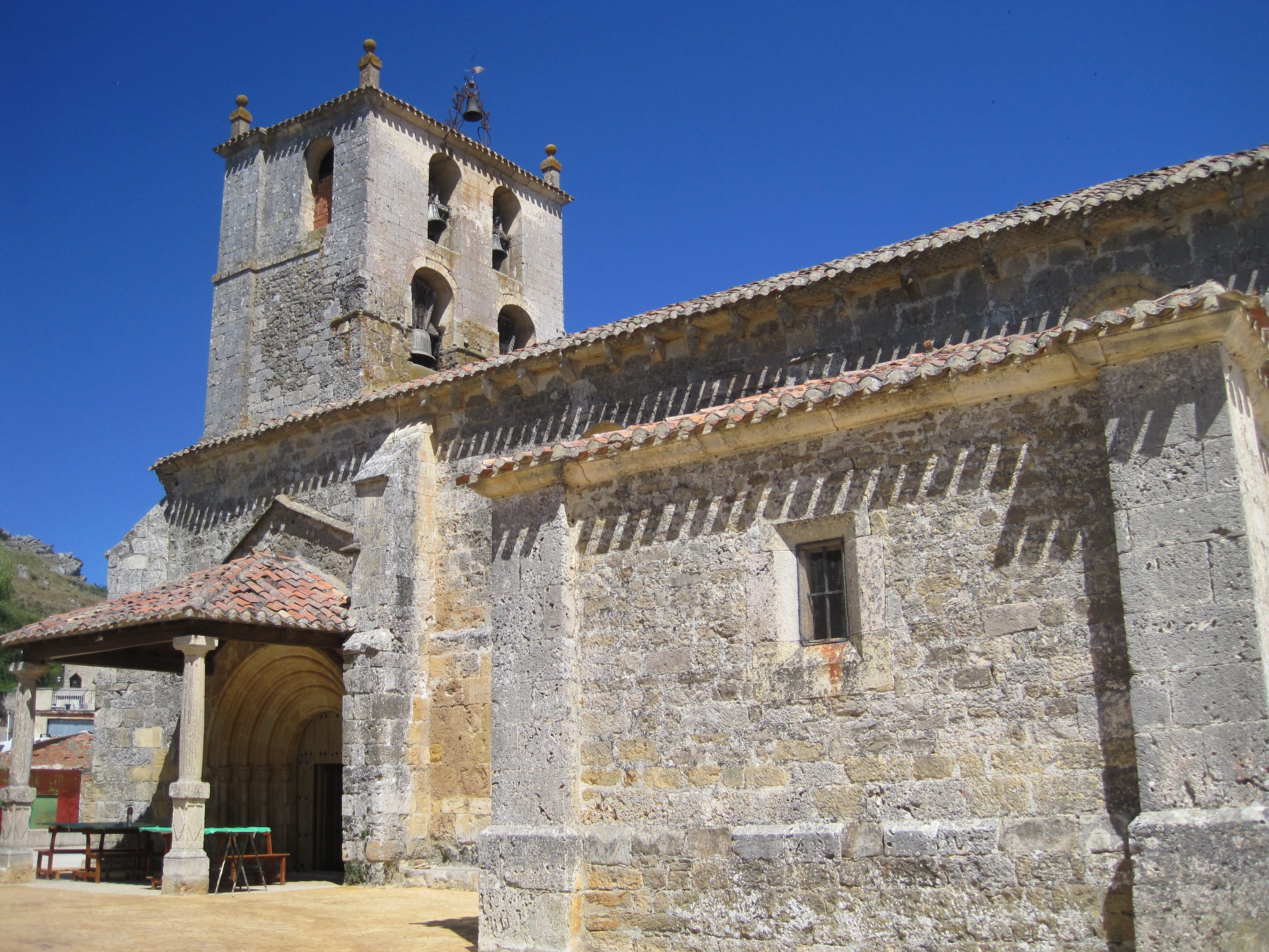 Vista frontal de la iglesia parroquial de Montorio, del siglo XVII